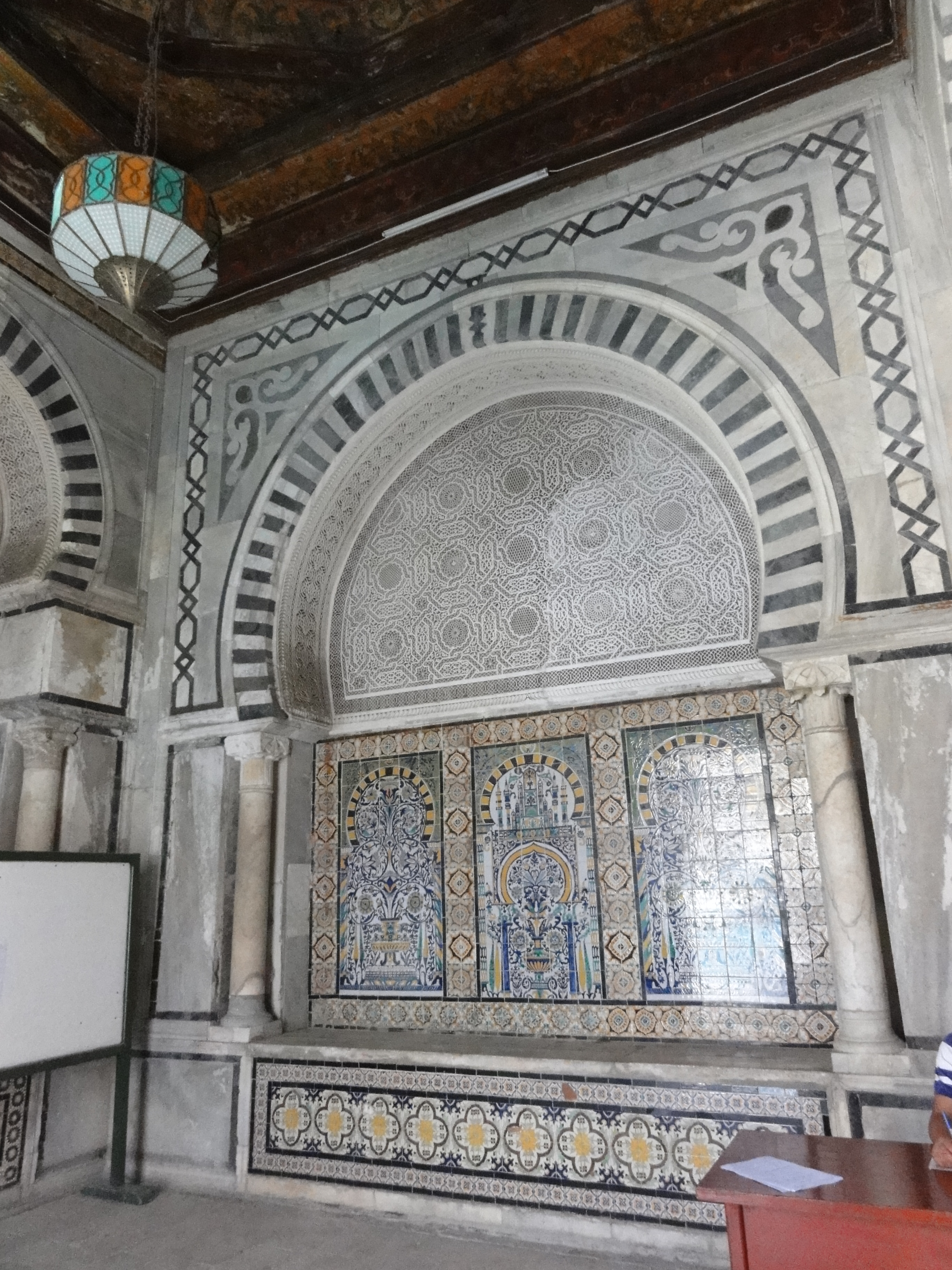 Décor intérieur du Dar Othman, palais de la médina de Tunis.